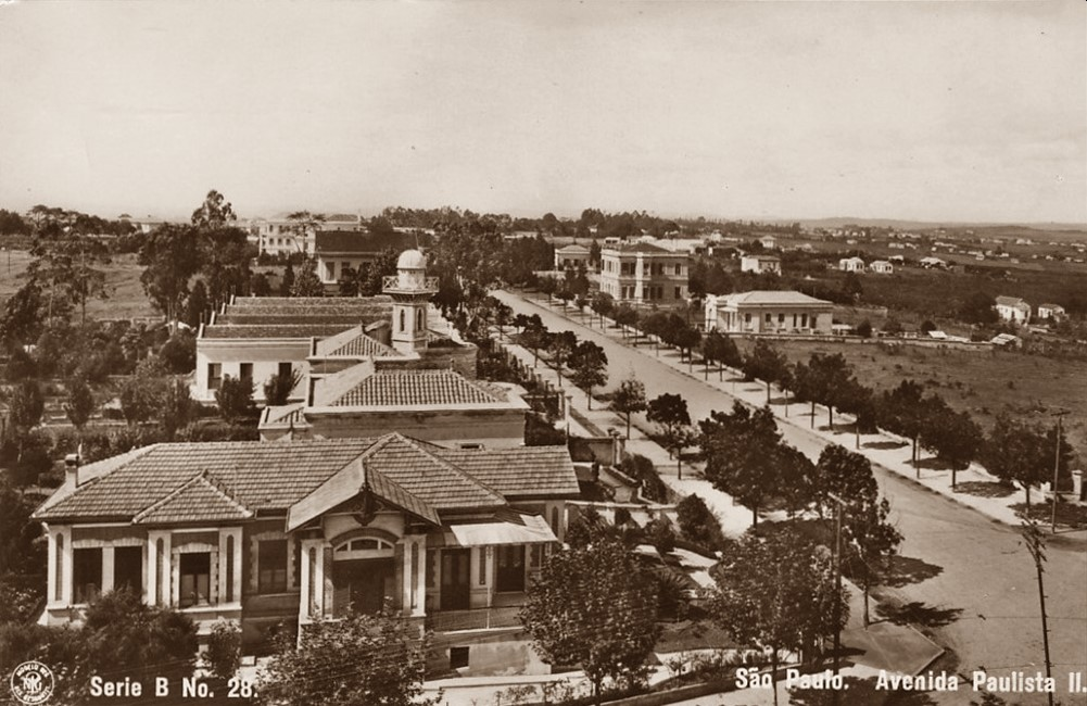 Postal sépia da Avenida Paulista, vista em direção ao Paraíso - emissão de Guilherme Gaensly, série B, nº 28